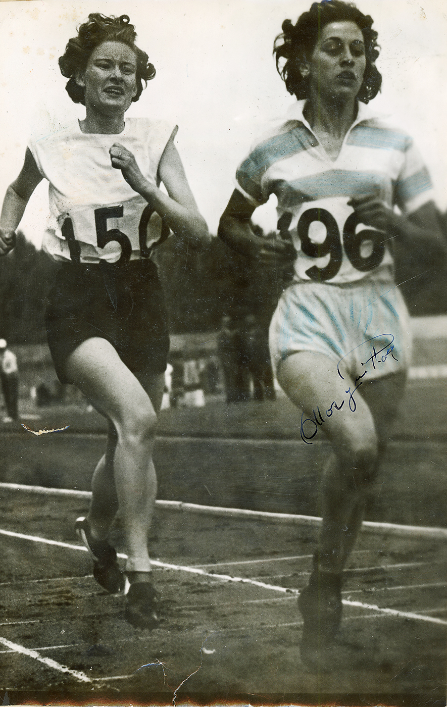 Lucette Desport dans la foulée d'Odile Monguillon, qui va battre le record de France du 800m le 8 juin 1952 au stade de Colombes.